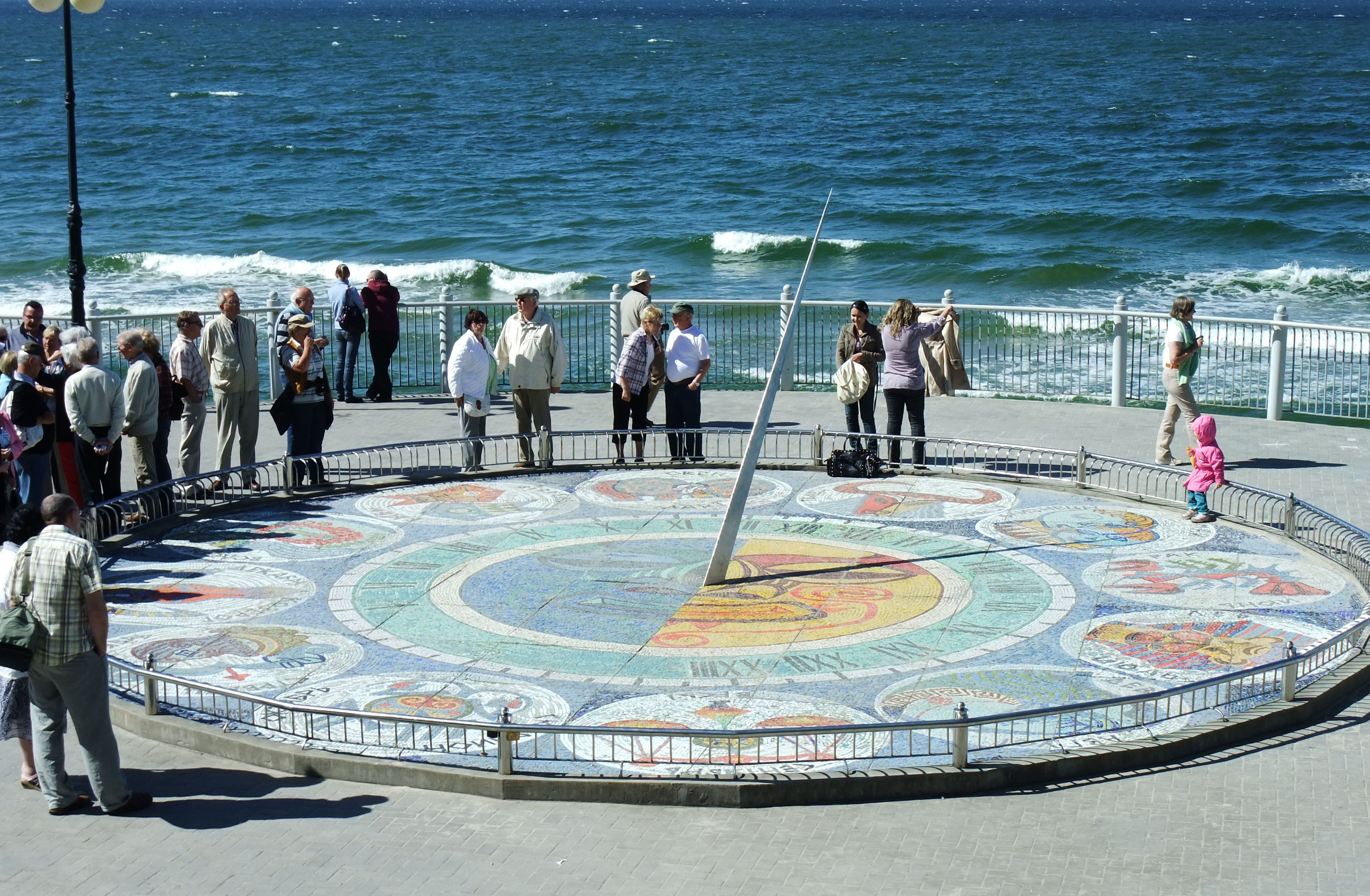 Sonnenuhr in Swetlogorsk (dt. Rauschen) bei Königsberg, Russland